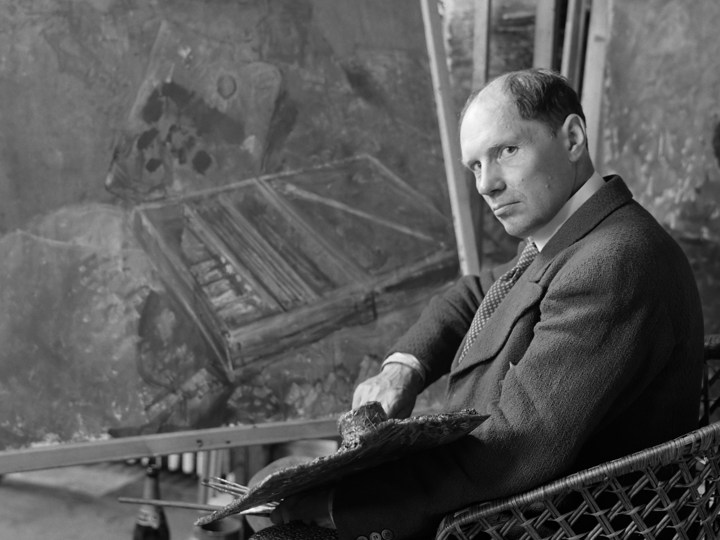 De schilder Jóhannes Sveinsson Kjarval aan het werk in zijn atelier 1934